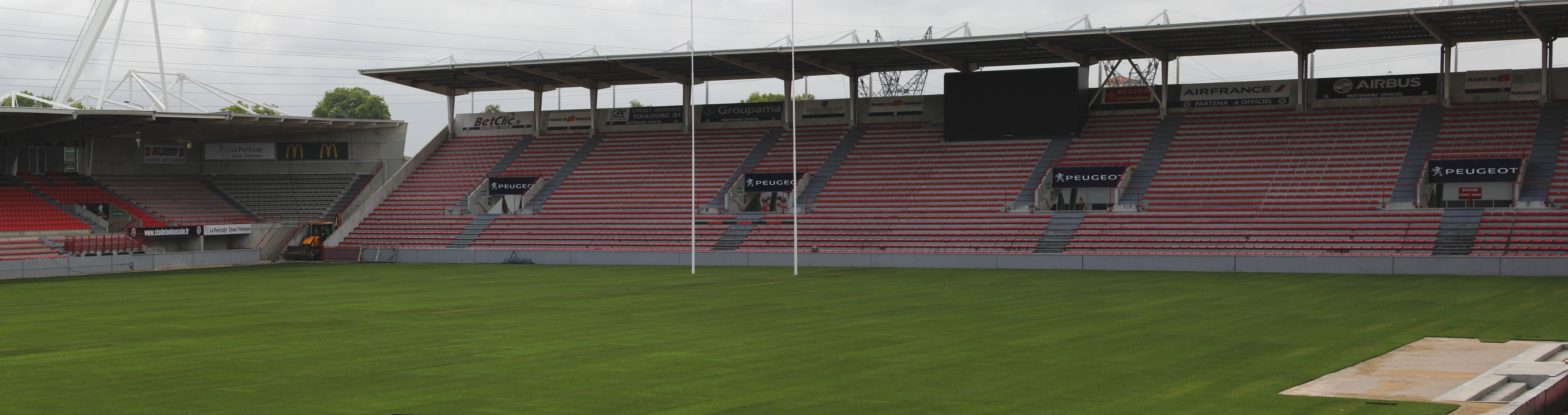 Pelouse du Stade Ernest Wallon